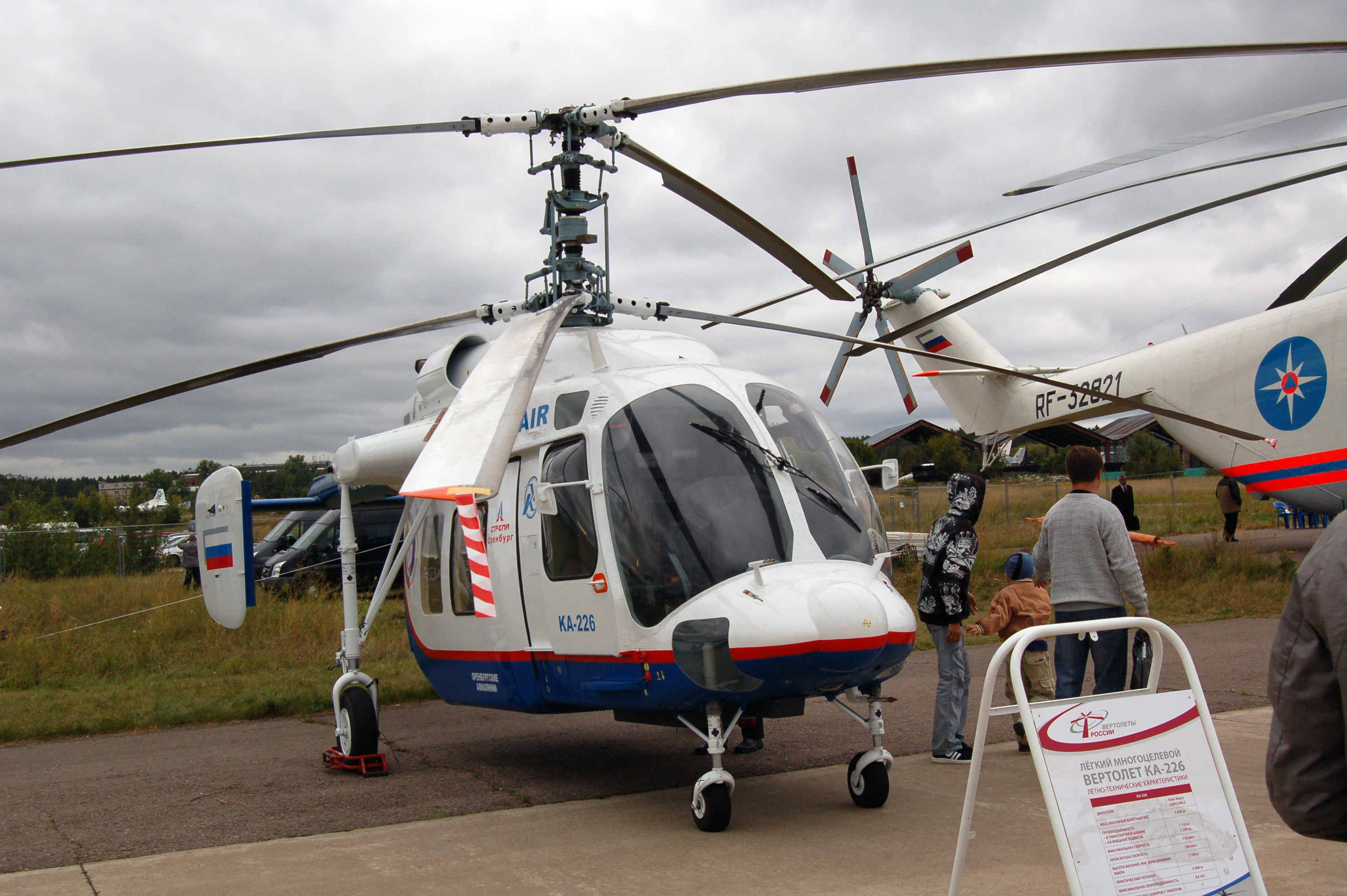 Ка-226 Оренбургских Авиалиний на МАКС-2009